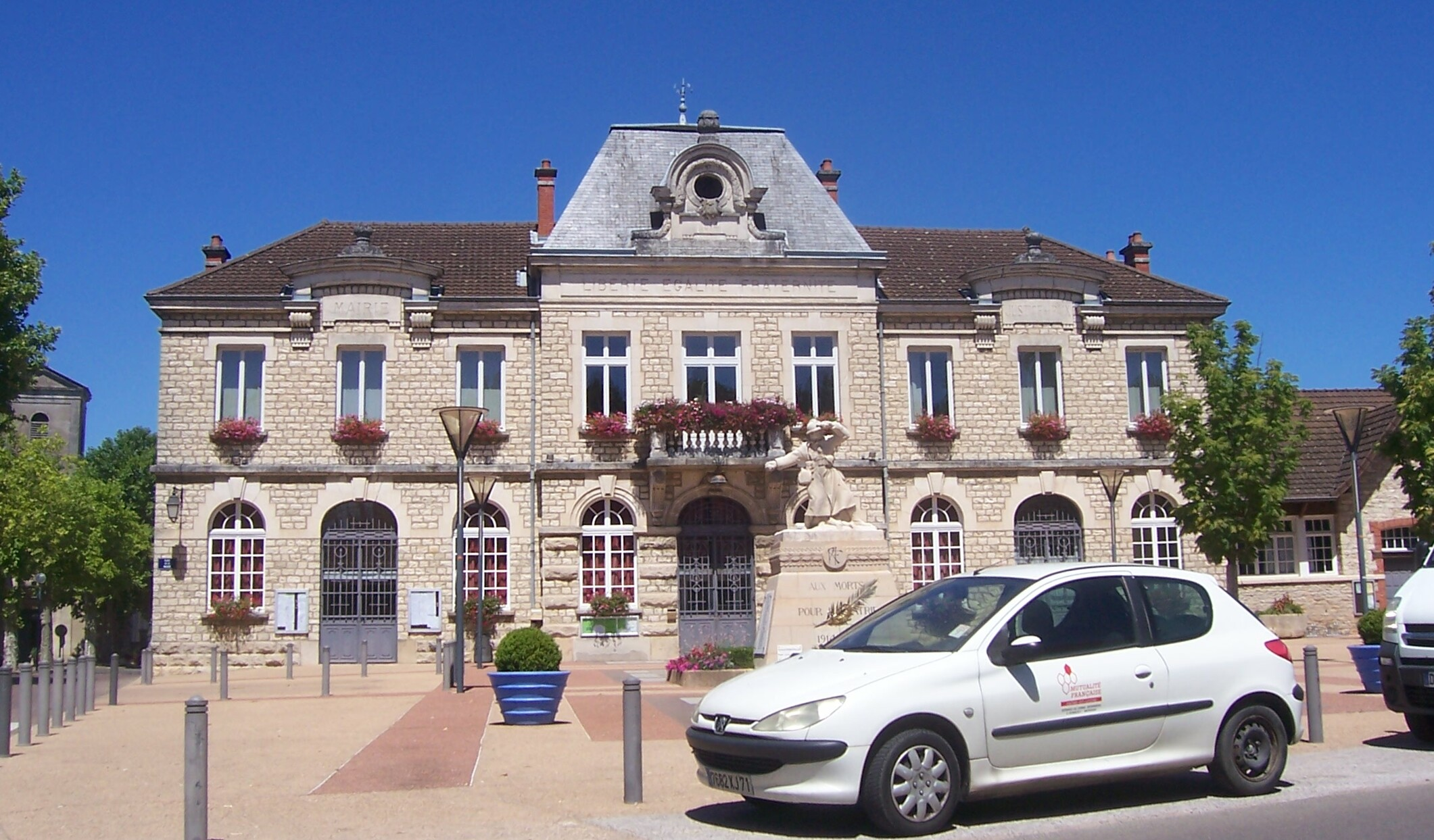 Mairie de Saint-Germain-du-Plain